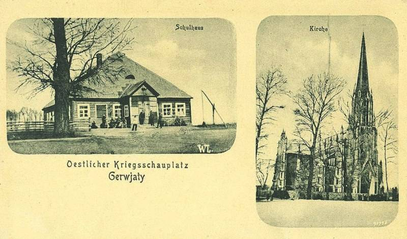 Беларуская (тарашкевіца): Гервяты (Gierviaty)